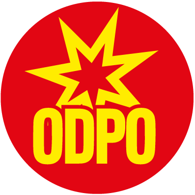 Logo de l'ODPO